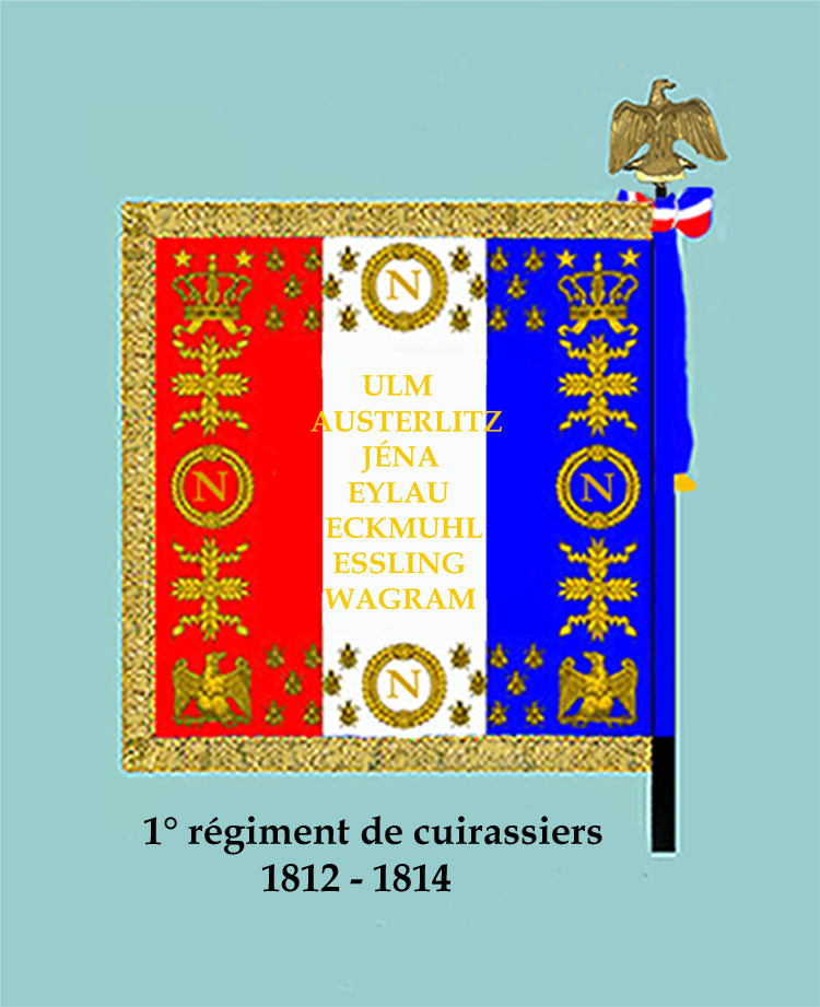 Drapeau du 1er régiment de cuirassiers de 1812 à 1814